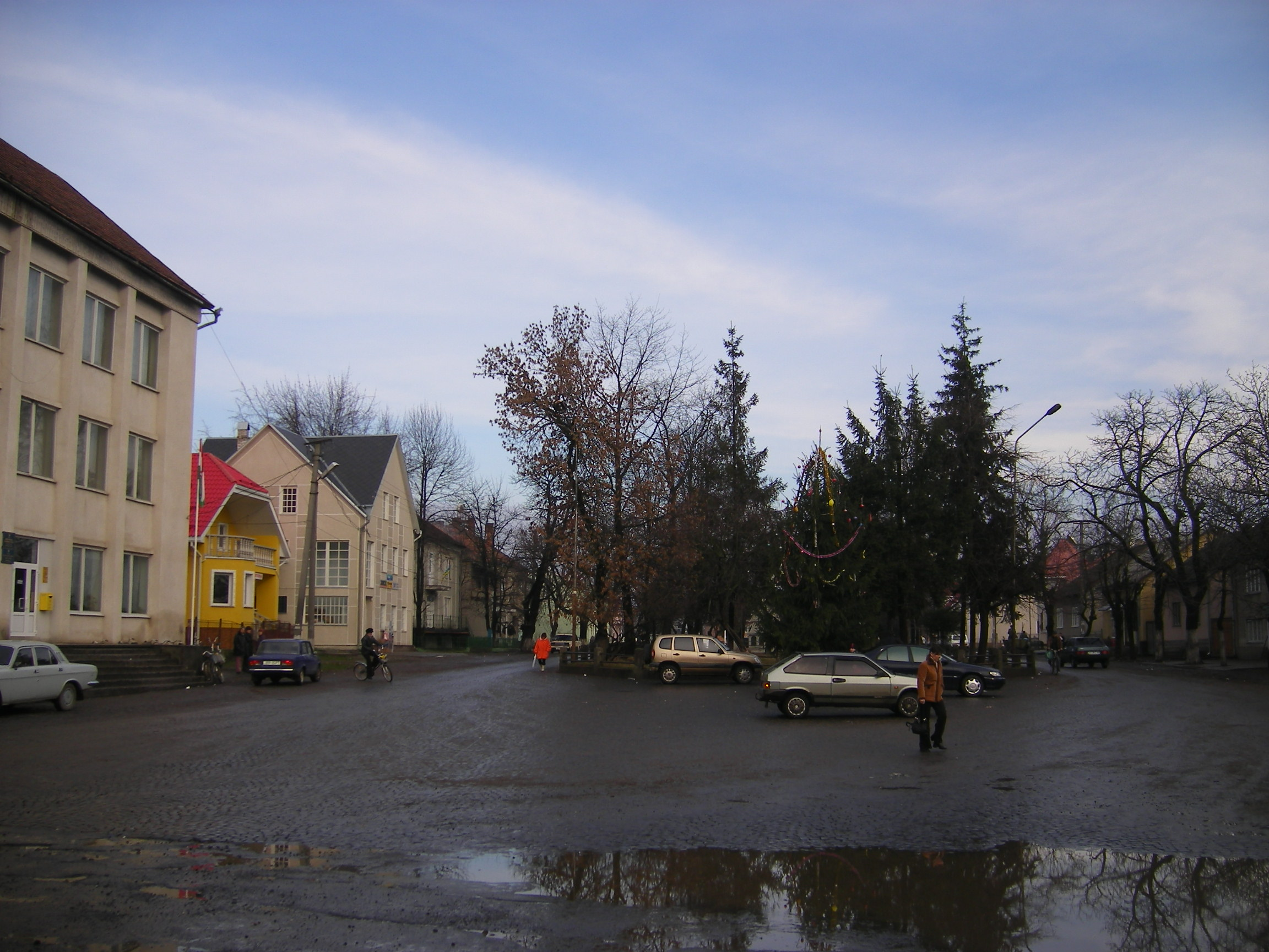 Visk (Vyshkovo), main square